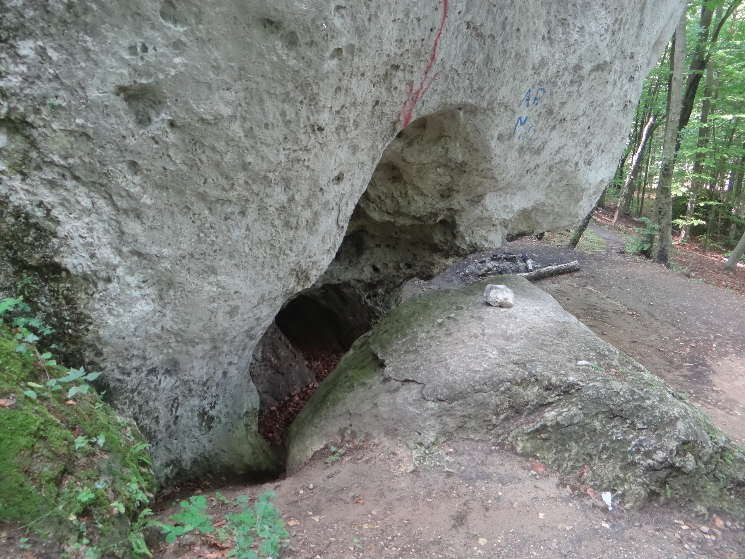 Jaskinia w Kruczej Skale. Lokalizacja: Polska, Wyżyna Częstochowska, Skały Kroczyckie, wzgórze Łysak, skała Wysokie Okapy